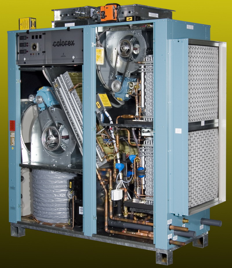 Calorex Delta 14